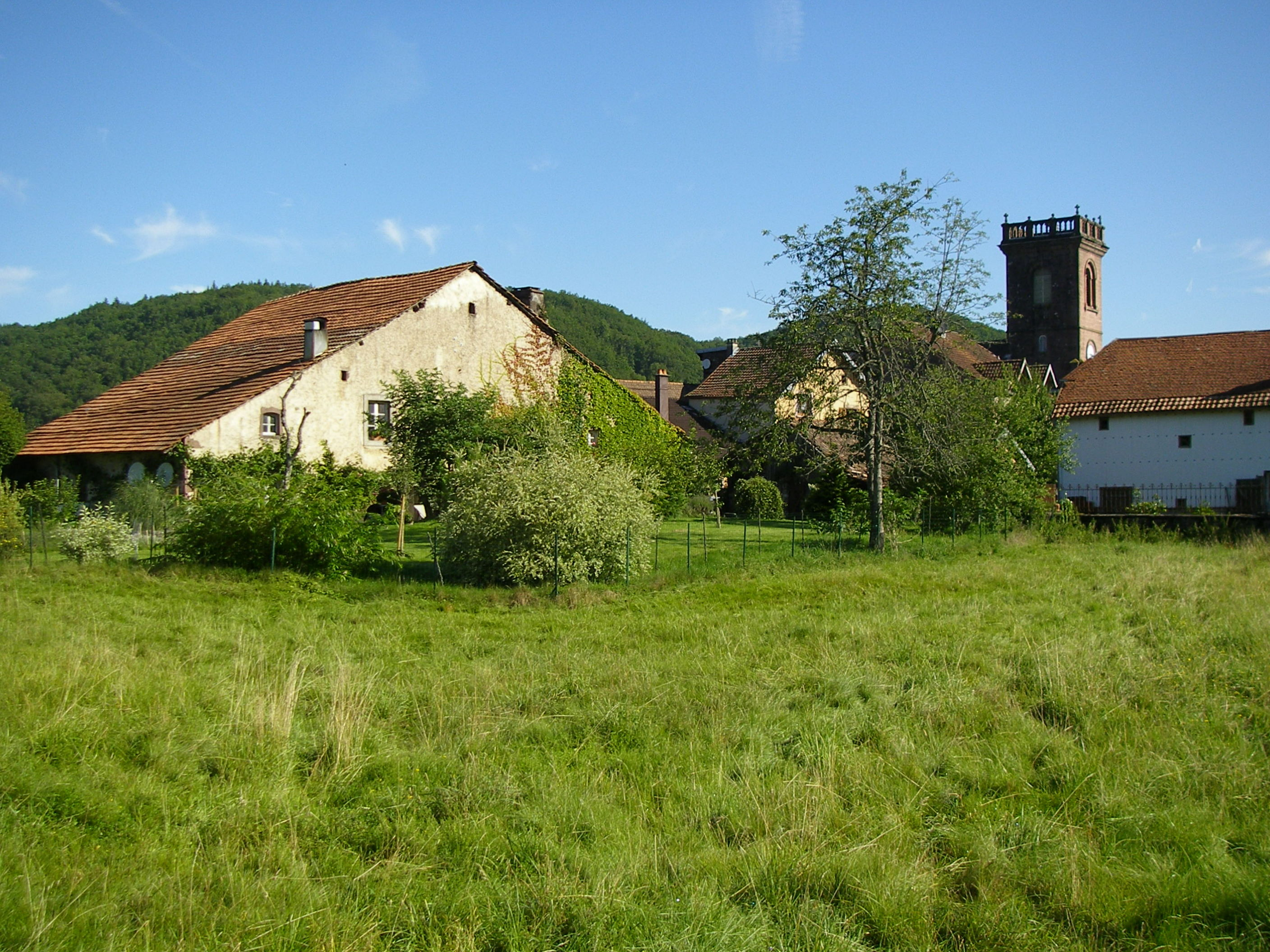 Ternuay (Haute-Saône, France)